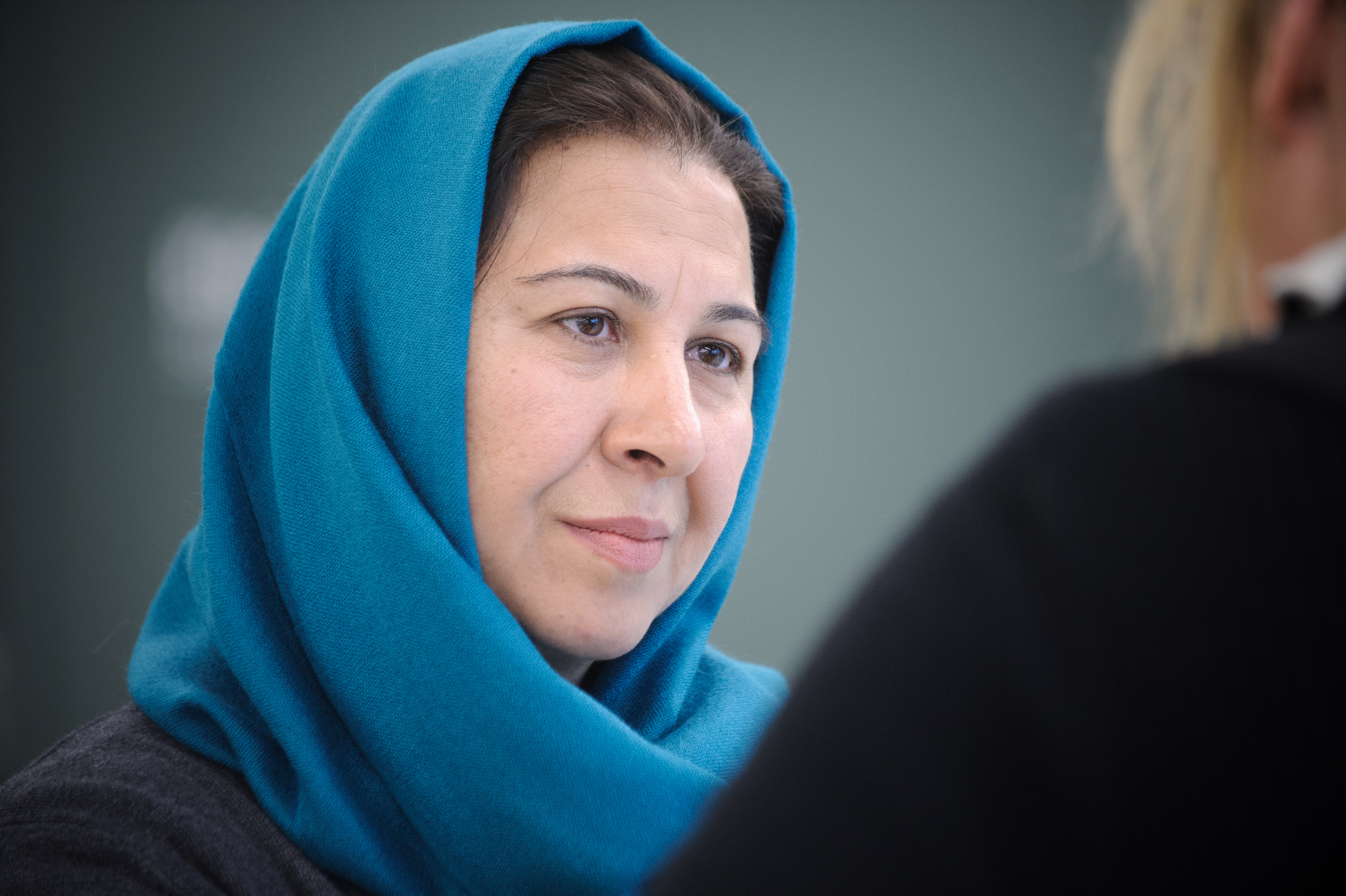 Shinkai Karokhail (Parlamentsabgeordnete, Afghanistan) 10 Jahre nach Petersberg Foto: Stephan Röhl